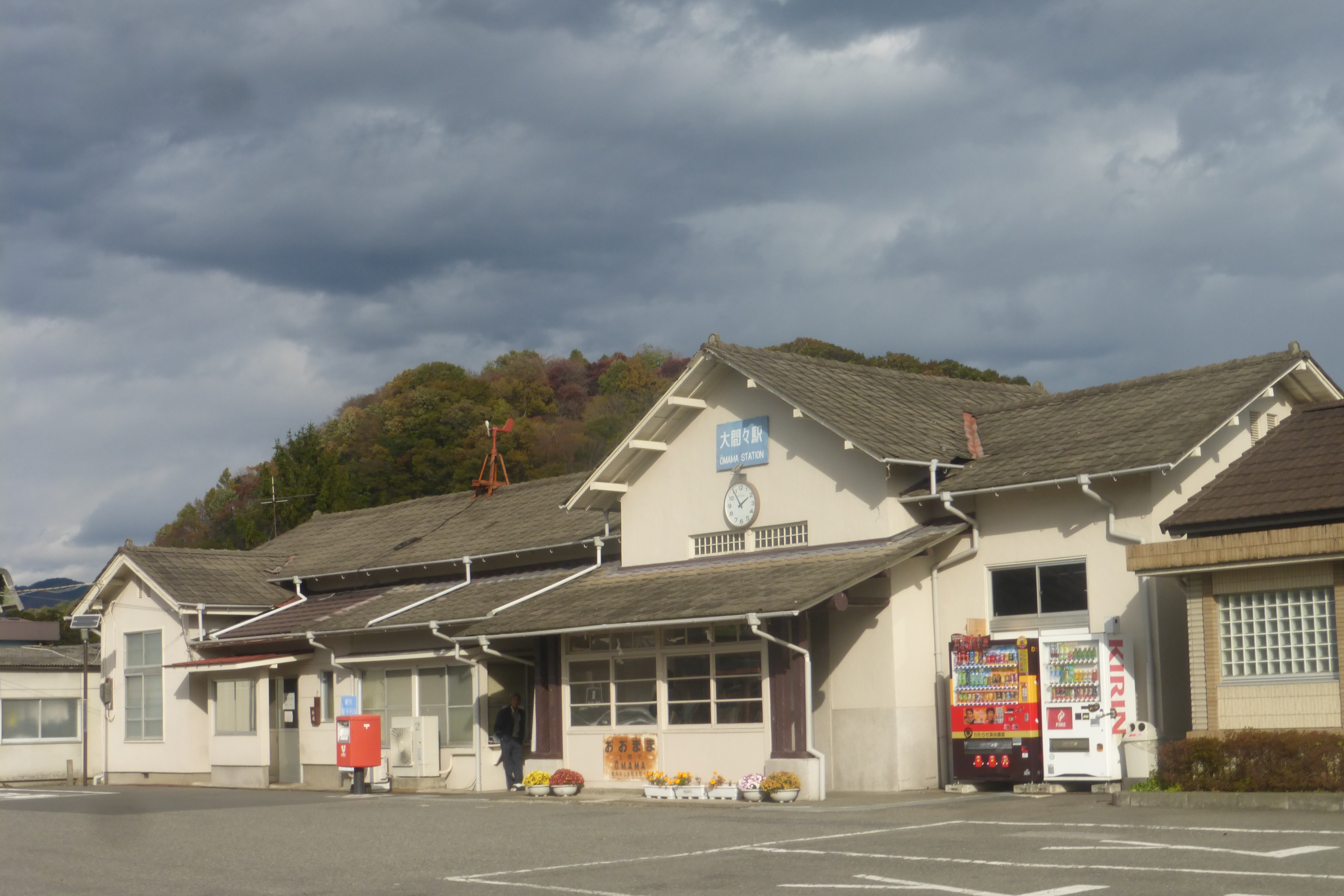 Ōmama Station (大間々駅)